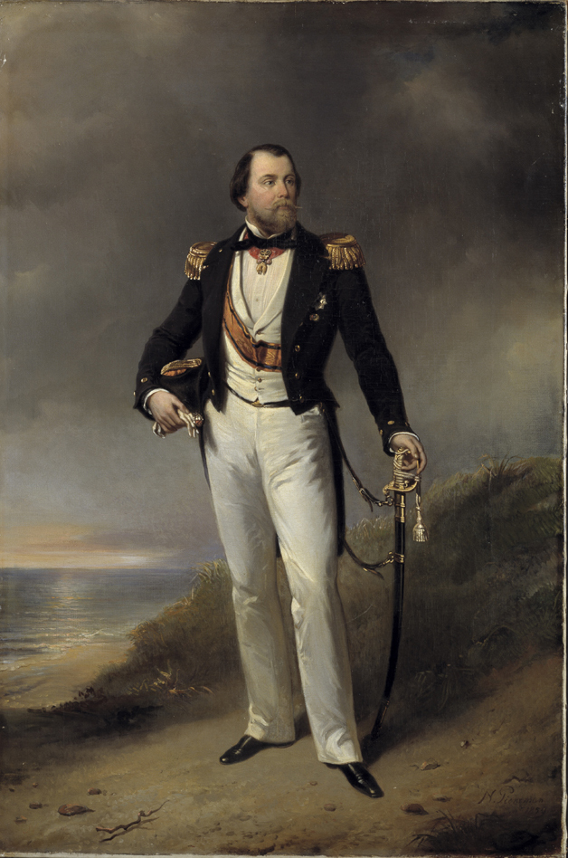 schilderij; portret; mansportret; Willem III, Koning der Nederlanden